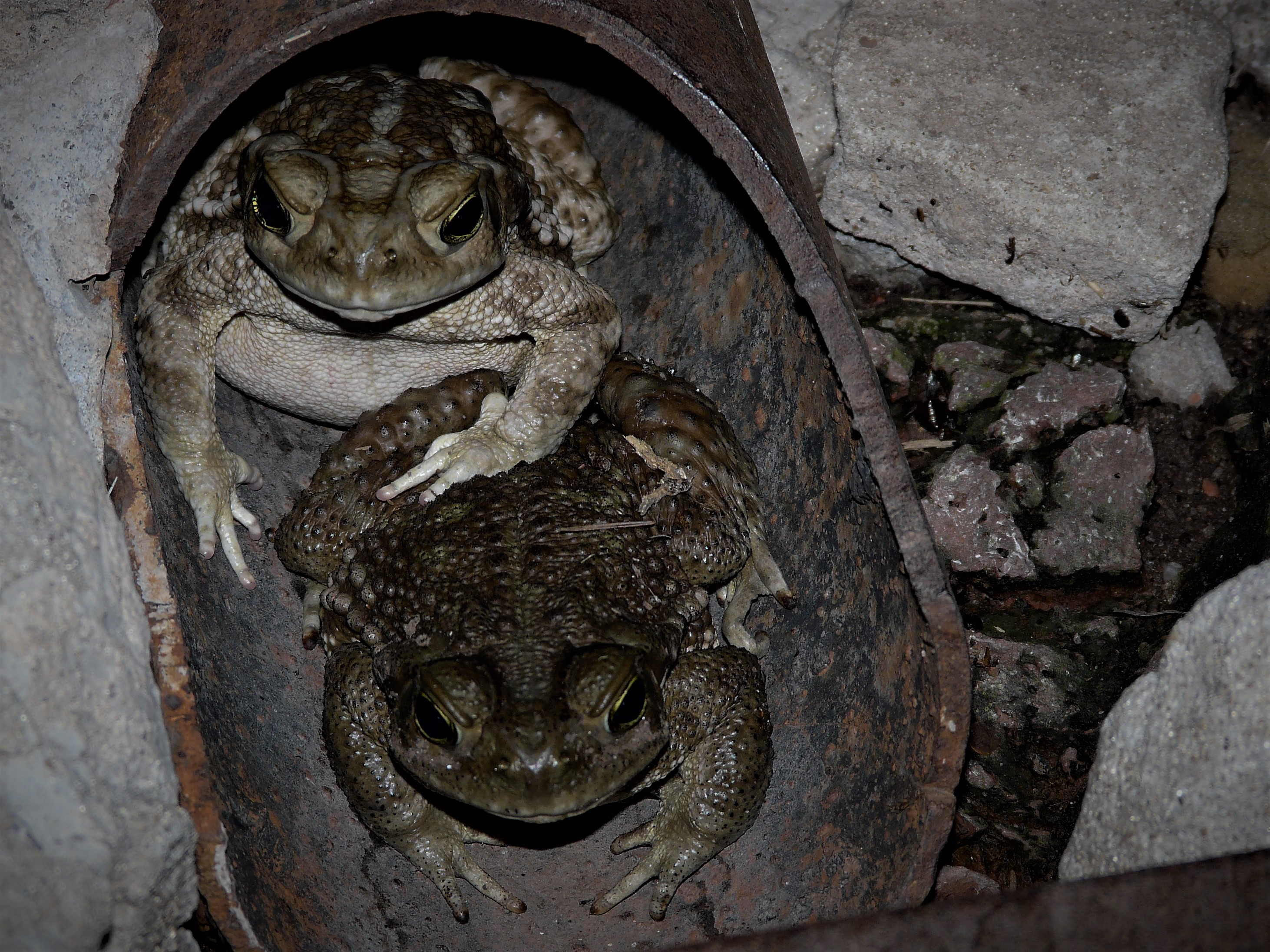 Los anfibios son considerados "centinelas ambientales", por las características particulares de su piel que es delgada y sumamente irrigada, por lo tanto permeable a los contaminantes ambientales.